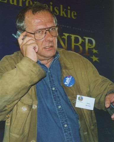 Adam Michnik (b. 1946), Polish journalist